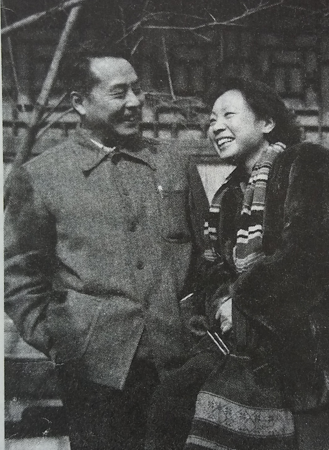 中文（中国大陆）: 王人美与叶浅予1956年